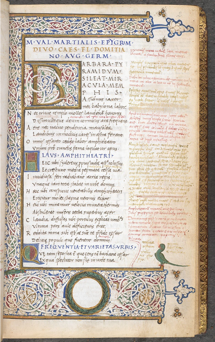 Humanistische Kursive vermutlich von Pomponio Leto; Initial und Buchschmuck von Bartolomeo Sanvito